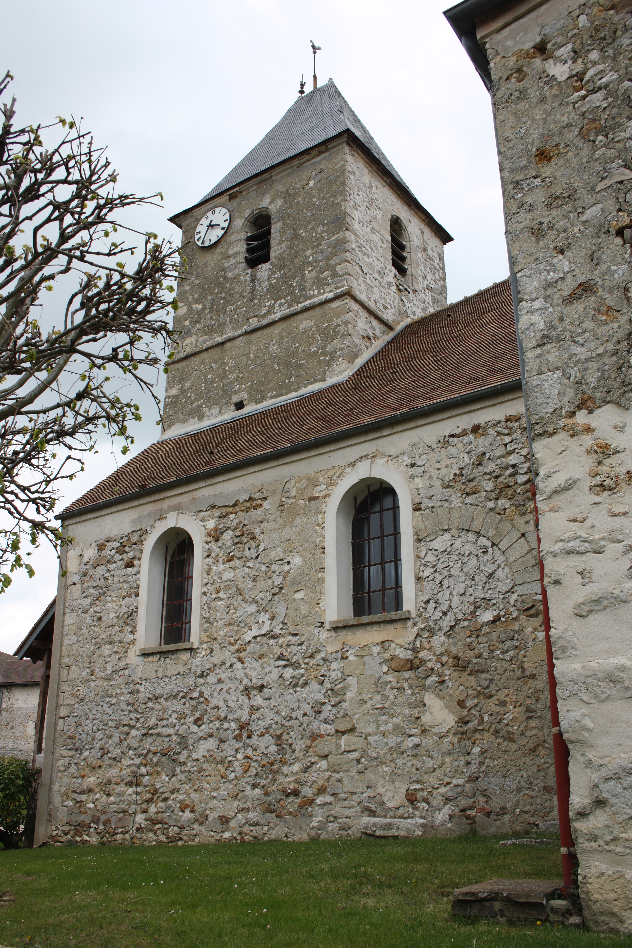 Kirche Saint-Denis in Drocourt (Yvelines)